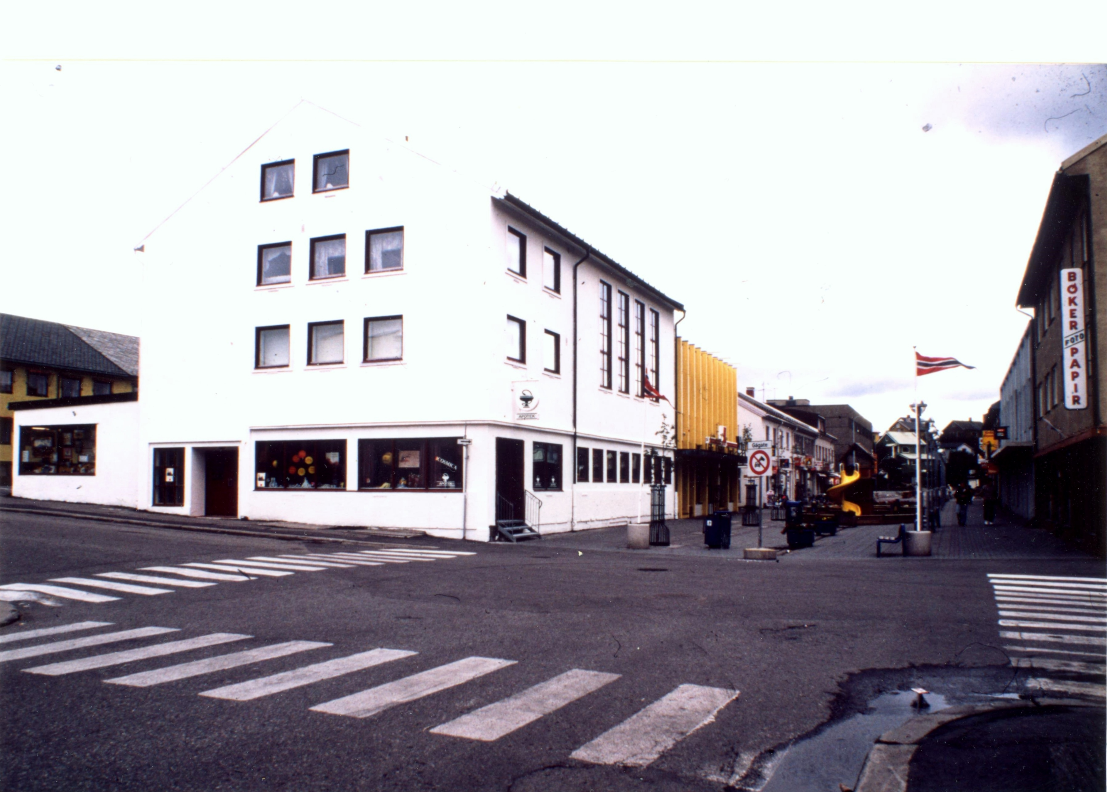 Bygget